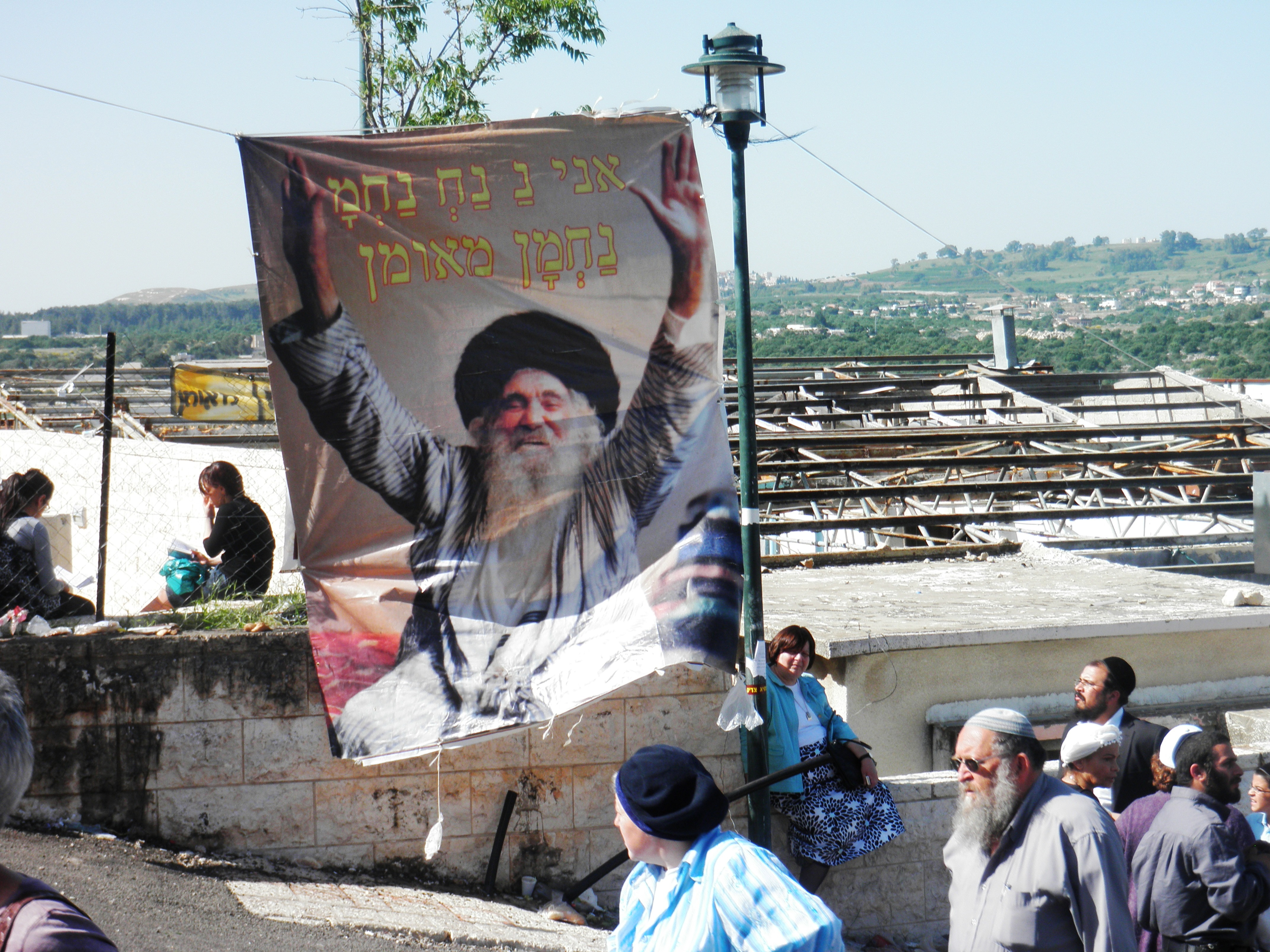 ל"ג בעומר 2011 קבר הרשב"י במירון